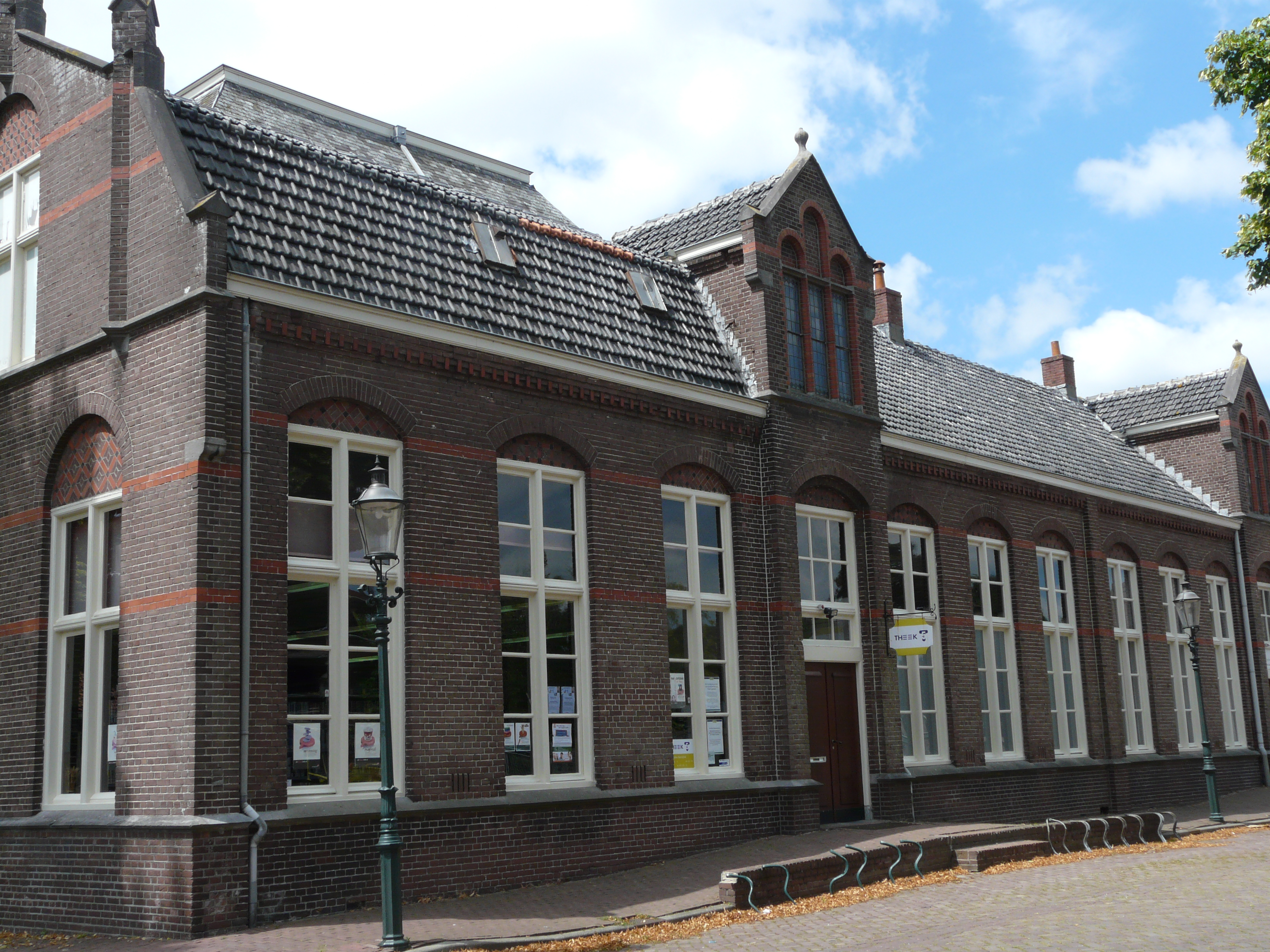 Bibliotheek in Raamsdonk